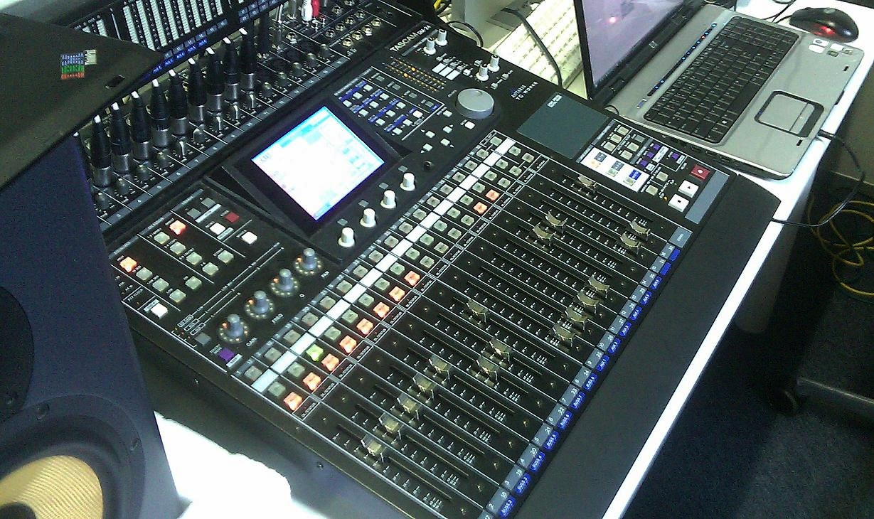 TASCAM DM-24 Digital Mixer 32 x 8 x 2 @ 24bit / 48kHz 16 x 8 x 2 @ 24bit / 96kHz